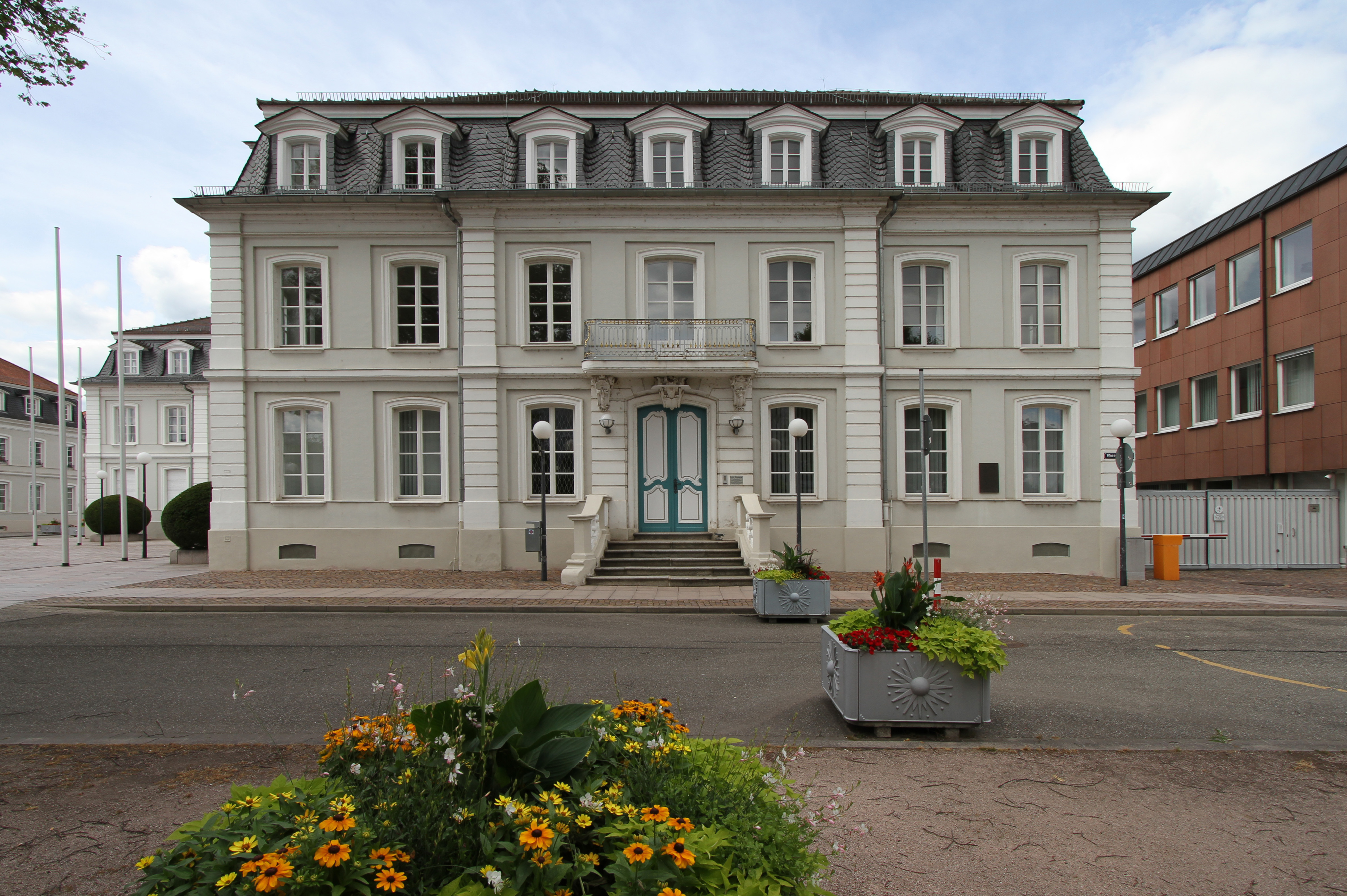 Zweibrücken